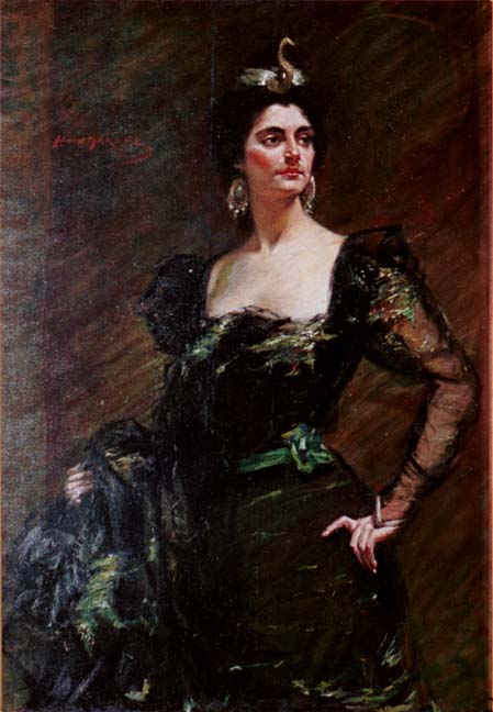 Selbstporträt